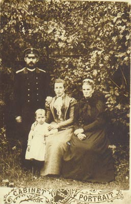 Таццяна Восіпаўна Мякота (бабка Максіма Багдановіча) і Валасовічы (сям’я цёткі Максіма Багдановіча Ганны). 1907 г.